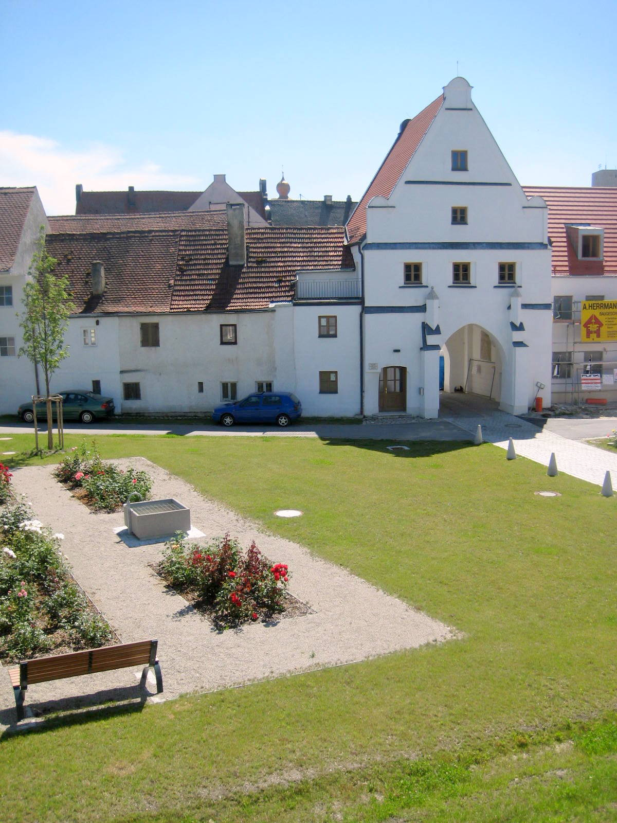 Vohburg an der Donau ist eine Gemeinde im Landkreis Pfaffenhofen a.d. Ilm.